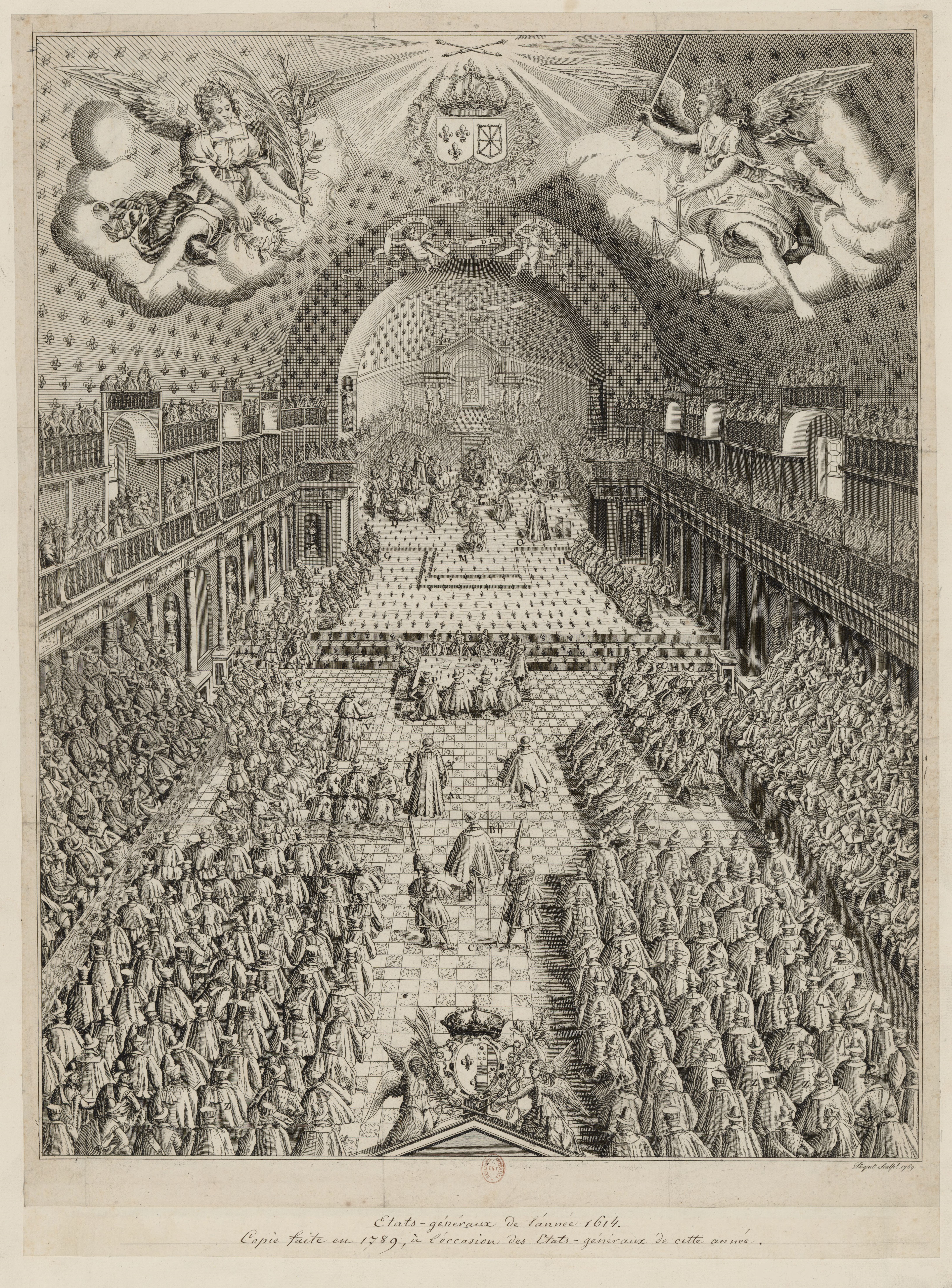 La salle du Petit-Bourbon lors de l'ouverture des états généraux de 1614. À l'origine théâtre privé du connétable de Bourbon (Charles III de Bourbon), situé dans son hôtel qui longeait le quai de la Seine entre le Louvre et l’église Saint-Germain-l'Auxerrois, au niveau de l’actuelle Colonnade. En 1658, la troupe de Molière est autorisée à y jouer.